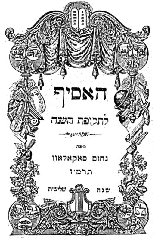 שער האסיף